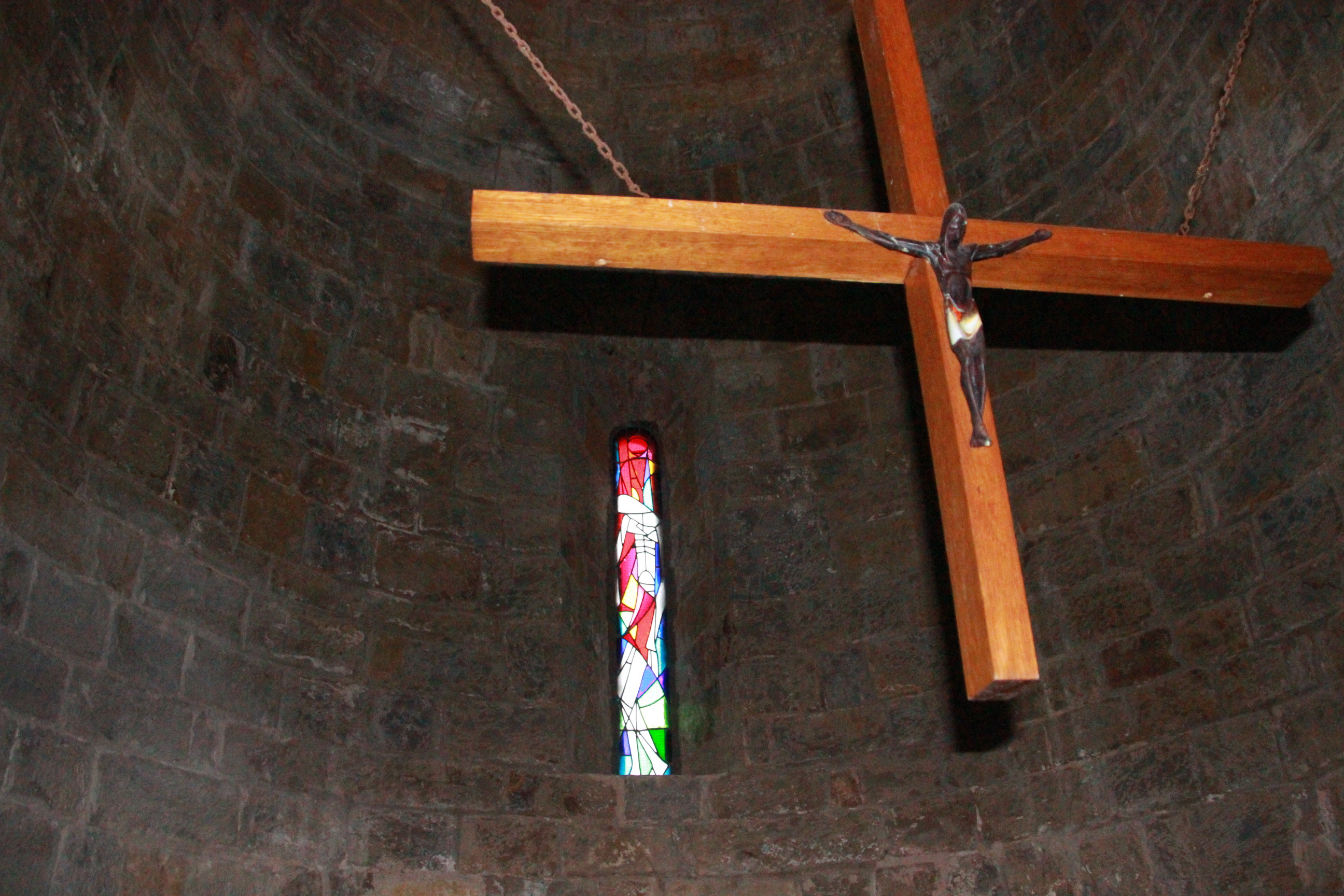 Sant Sepulcre de Palera (Beuda)